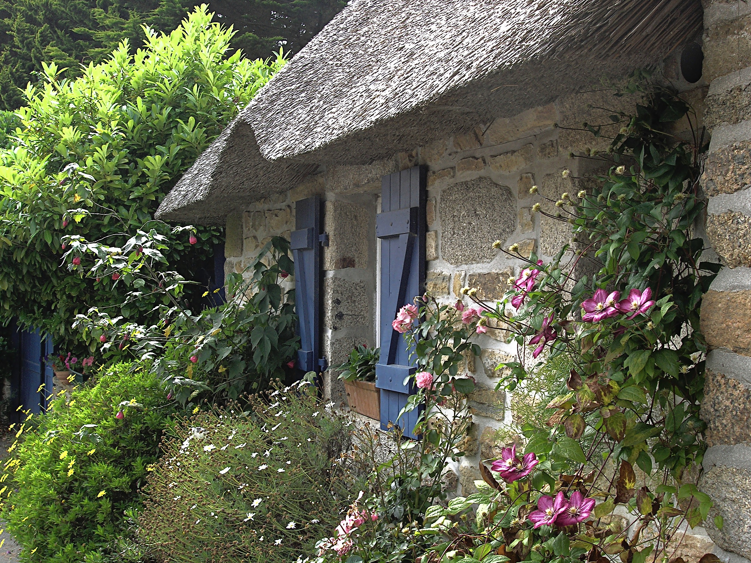 Kerascoët, (Névez)